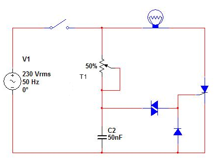 Zelf ontworpen schema.